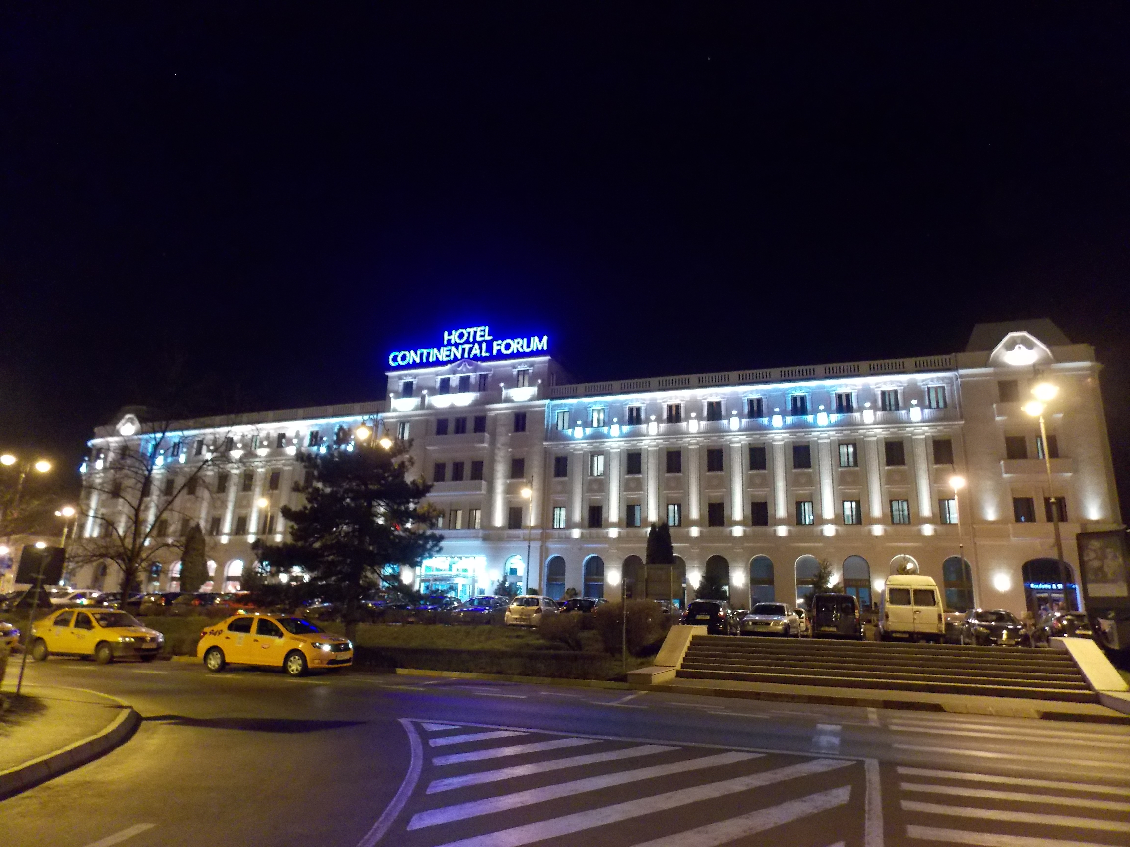 Hotel Continental Forum, formerly Bulevard, erected in 1876 and extended in 1914.